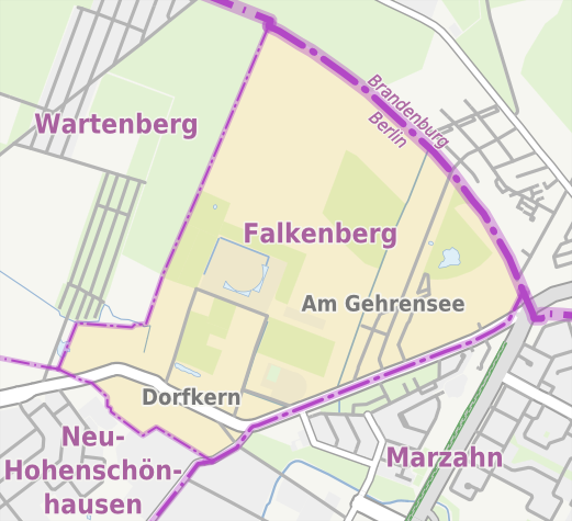 Übersichtskarte der Straßen und Ortslagen in Berlin-Falkenberg .